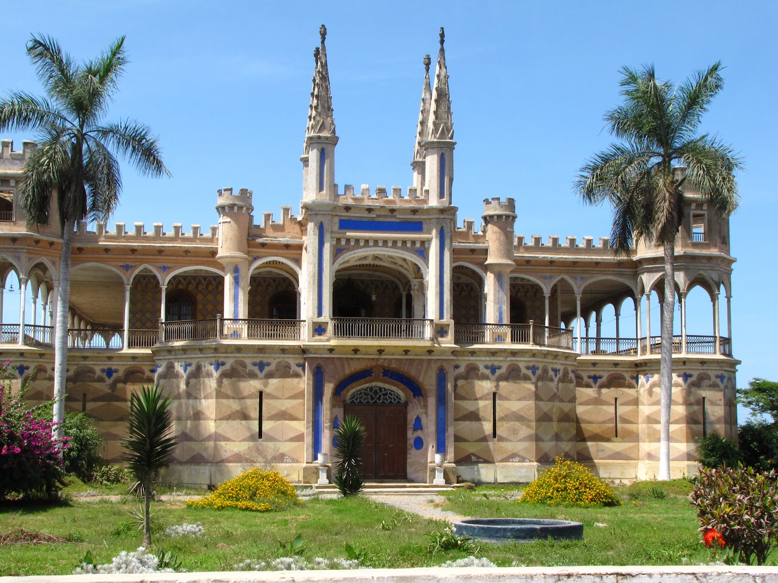 Castillo Unanue - Cañete